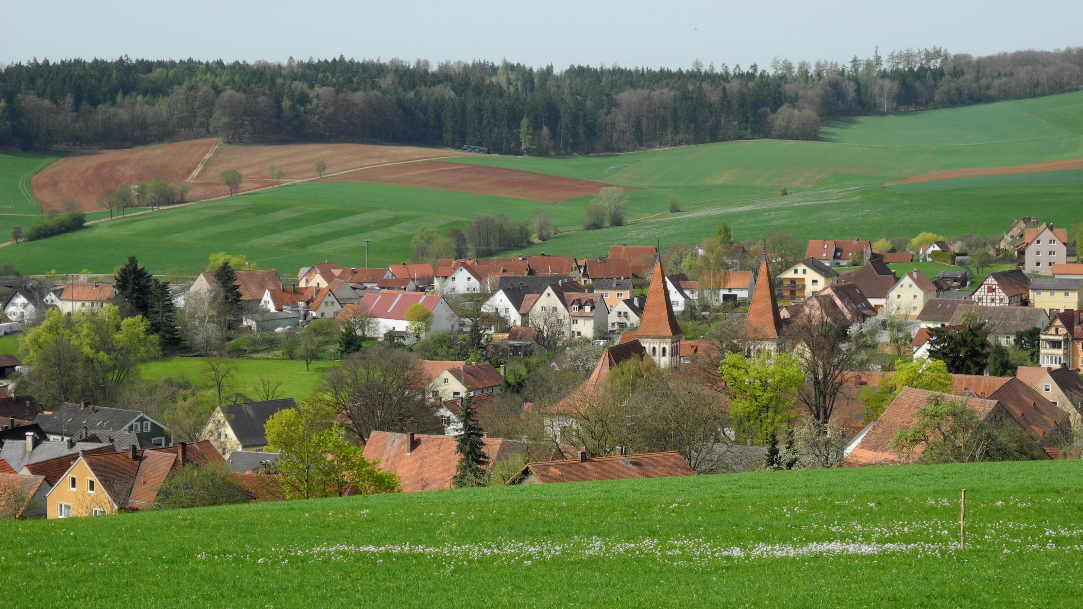 Heidenheim(Mittelfranken)-Kloster,SichtvonOsten